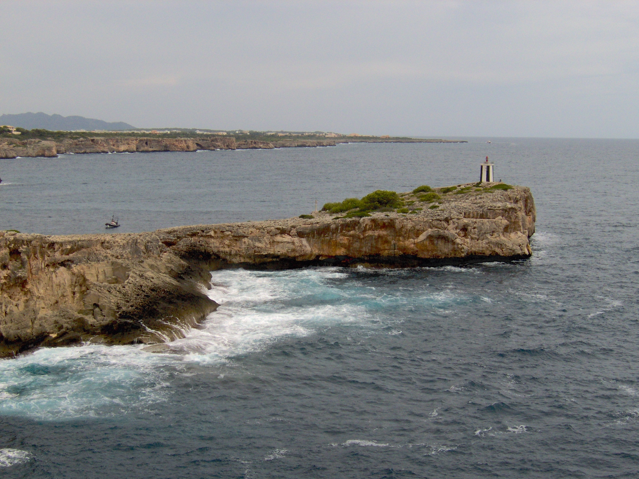 Hafeneinfahrt von Porto Cristo im August 2006